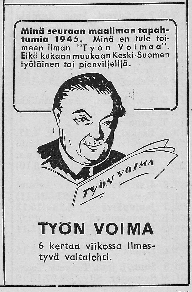 Jyväskylässä ilmestyneen lehden mainos Työväen Kalenterissa 1945